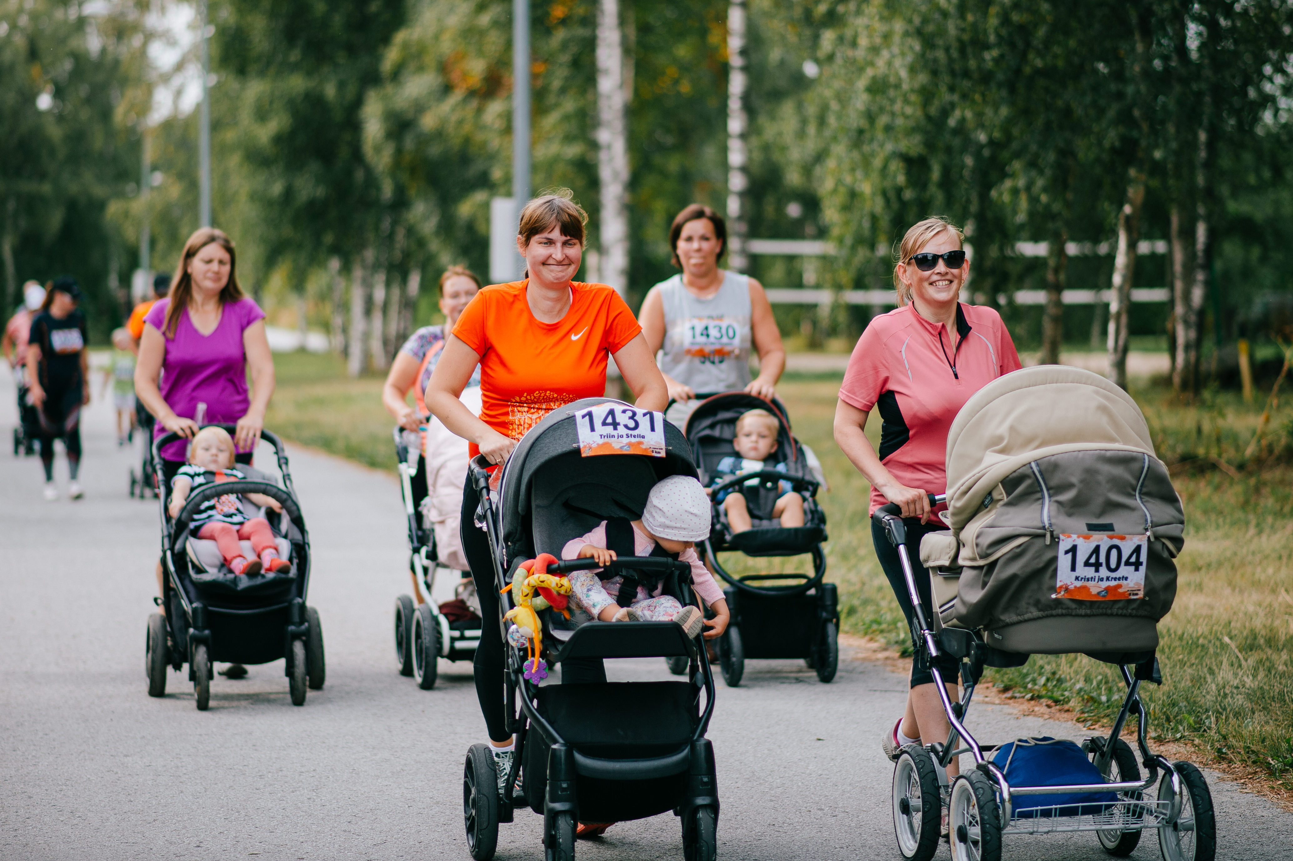 Lapsevankrijooks